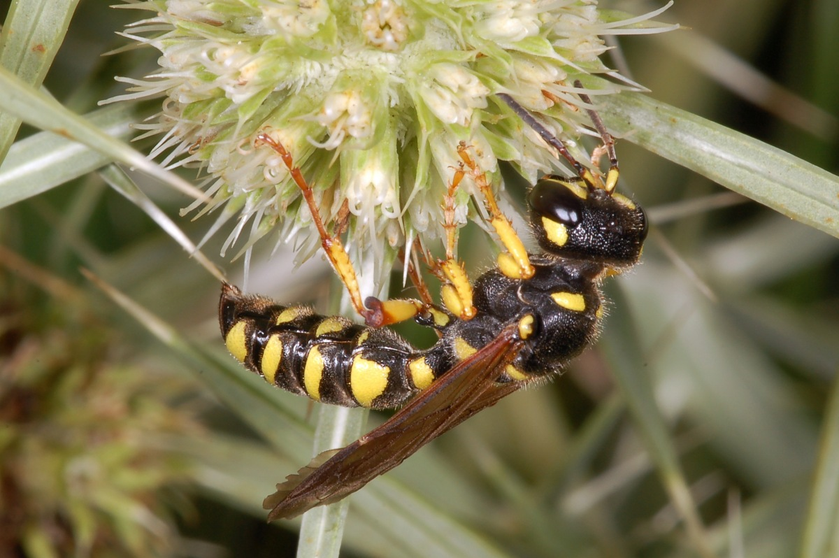 Cerceris arenaria, Schwanheimer Düne, Frankfurt am Main, Hessen, Deutschland